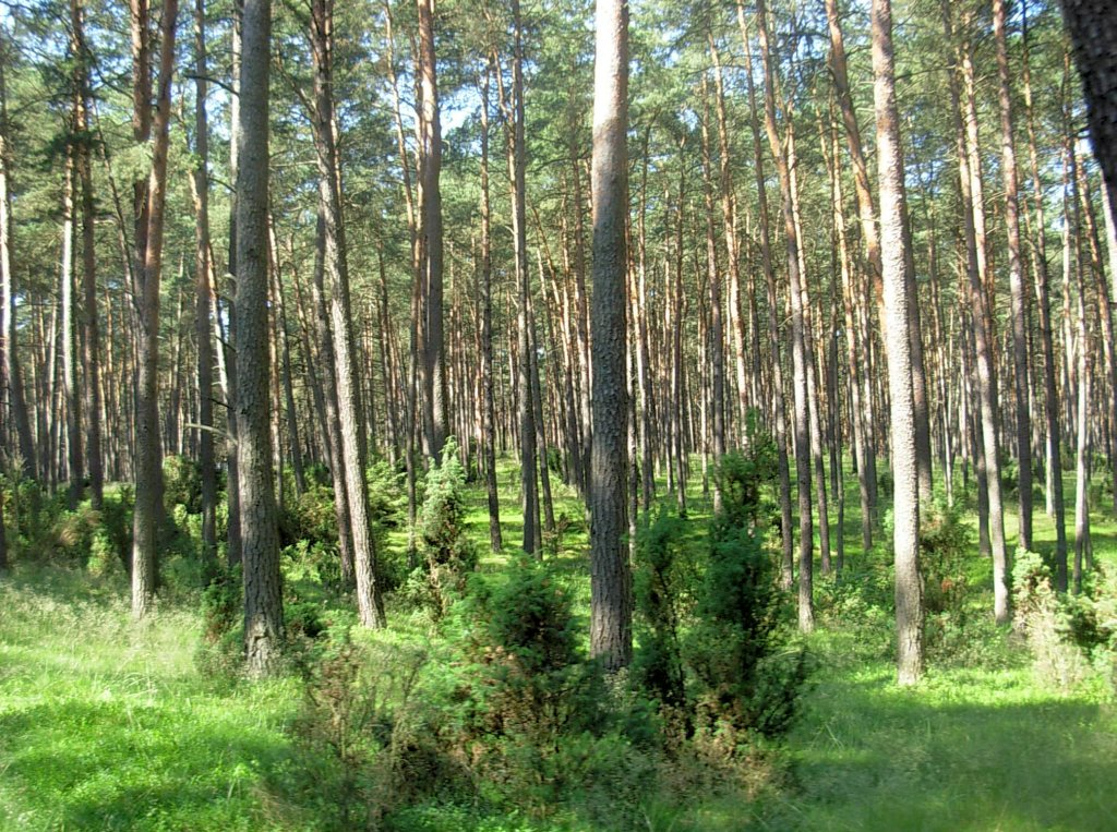 Puszcza Bydgoska - bór z jałowcami